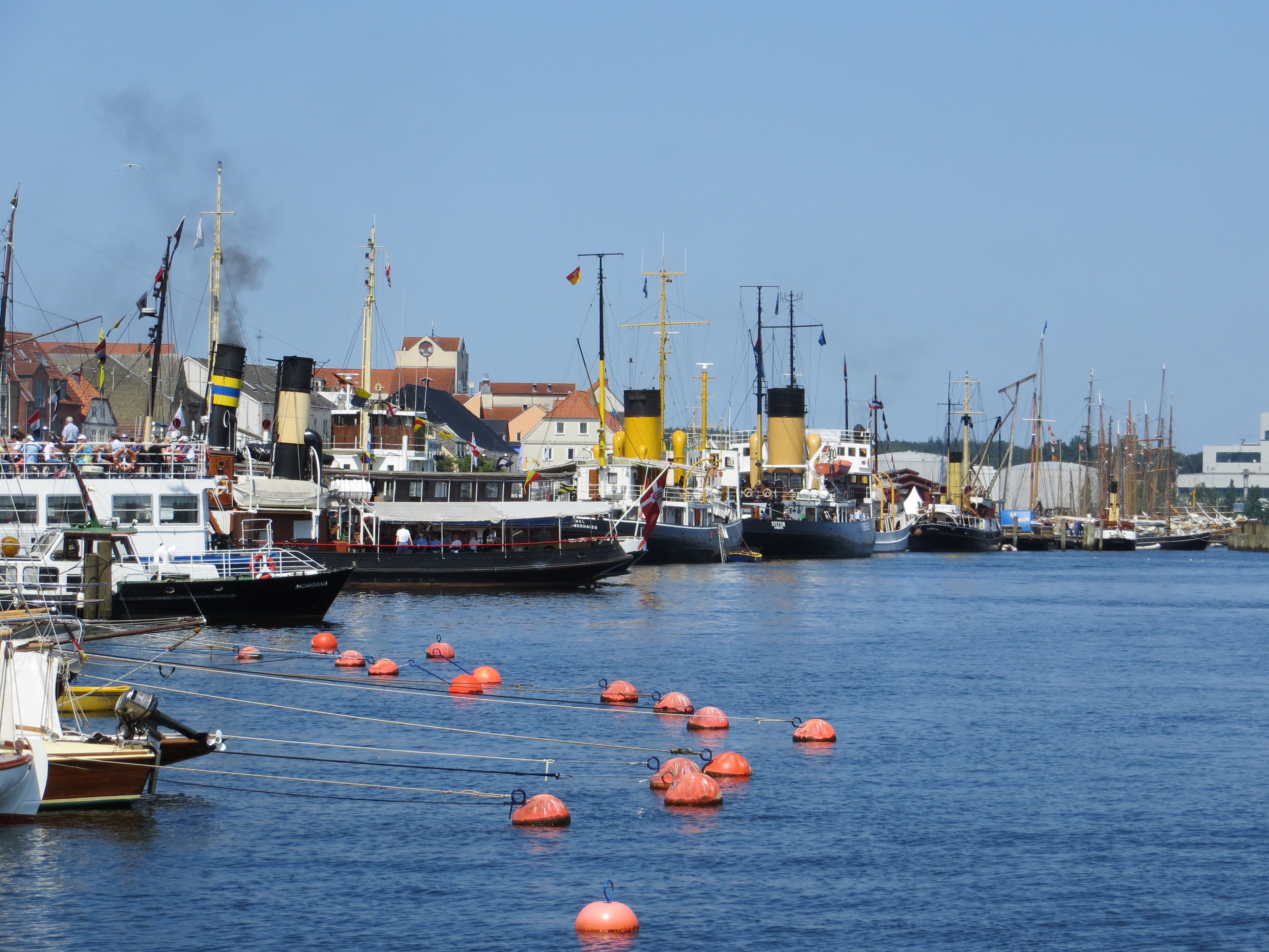 Flensburger Dampf Rundum 2013, Mehrere Dampfer, Der Dampfer Alexandra darunter, Bild 2 (Alexandra; siehe rauchenden Schornstein)